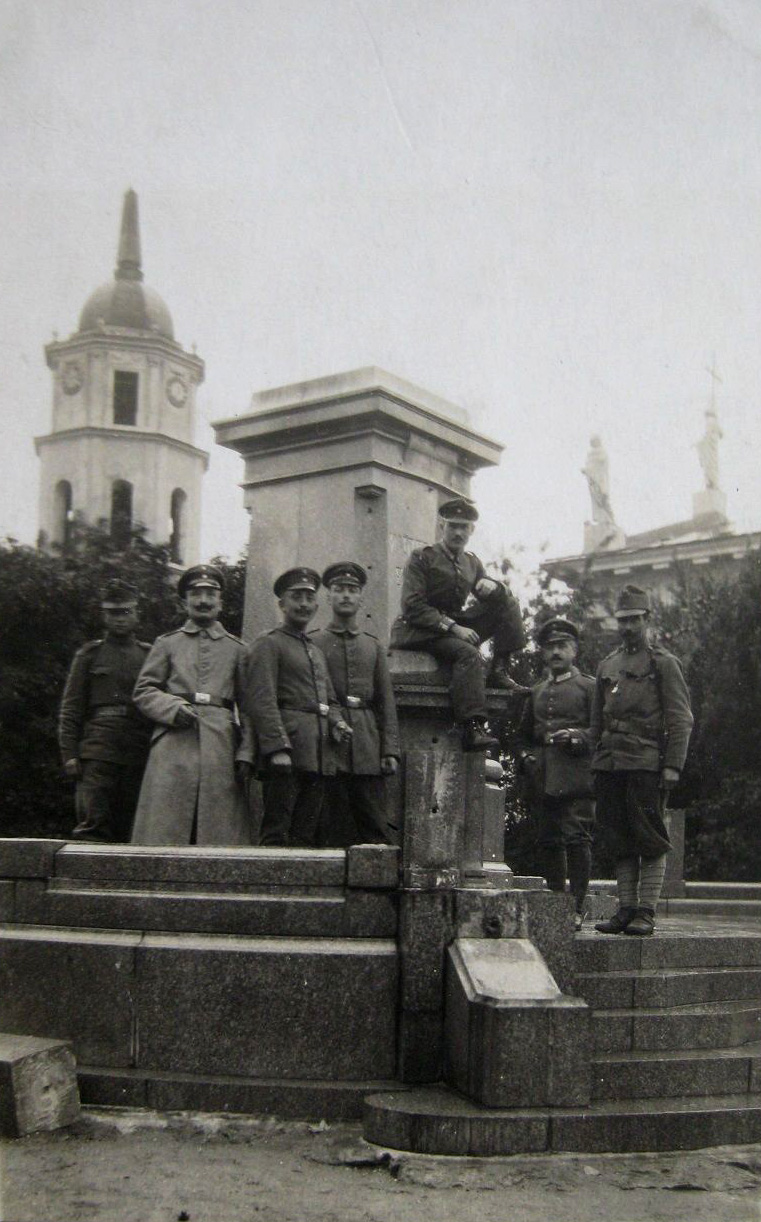 Vokiečių kariai prie demontuoto imperatorienės Jekaterinos II paminklo Vilniaus Katedros aikštėje, 1916 m.